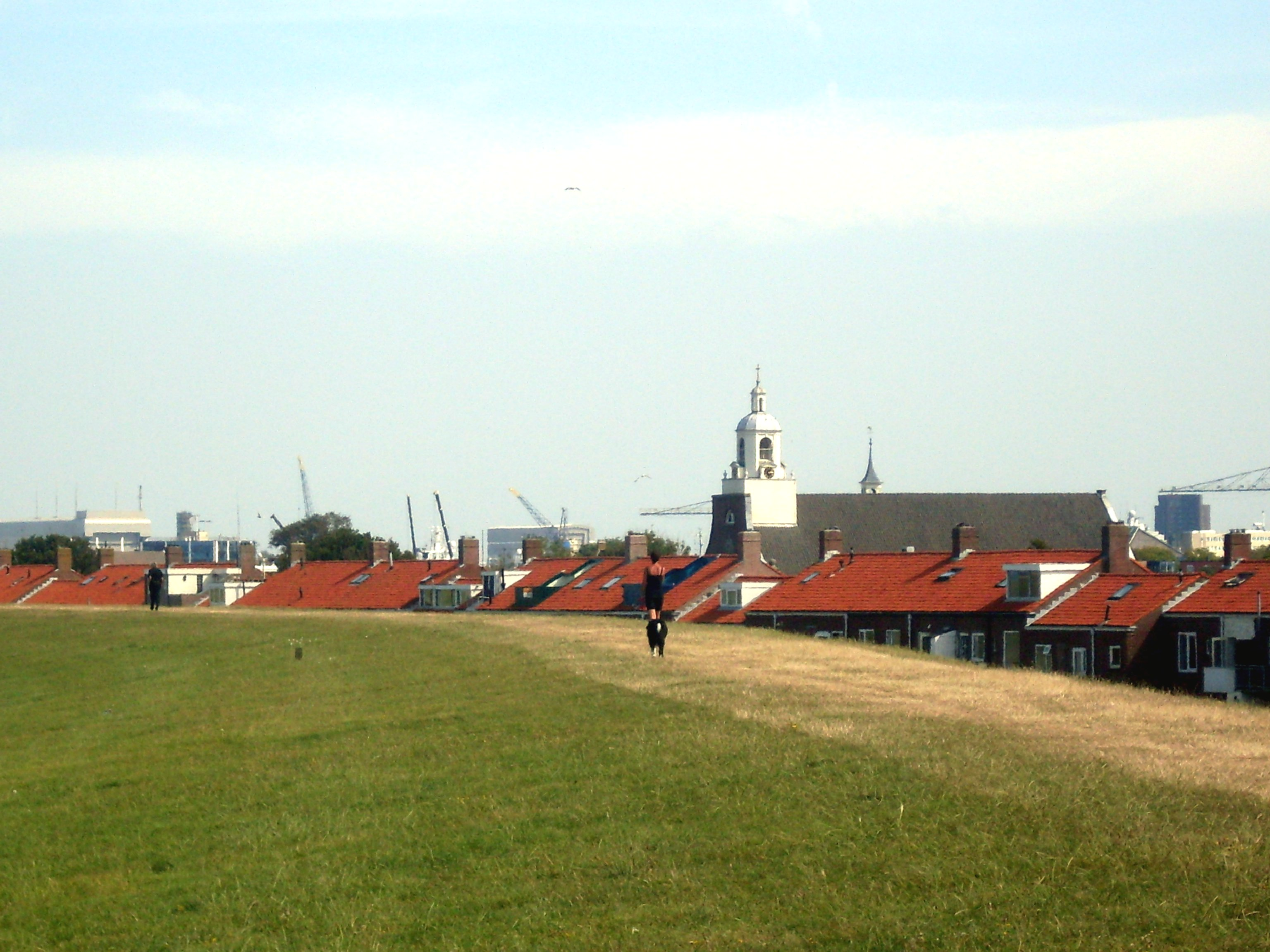 Den Helder vanaf de Zeedijk